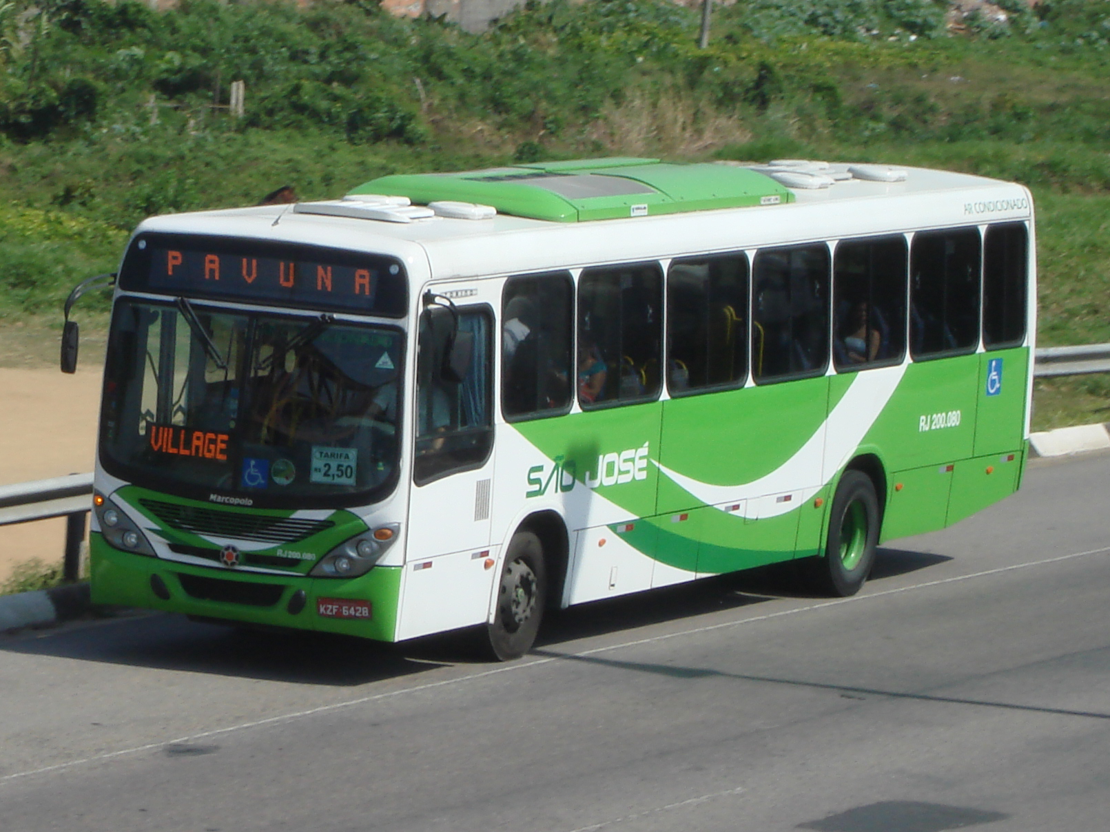 Foto do ônibus Marcopolo Torino da Viação São José